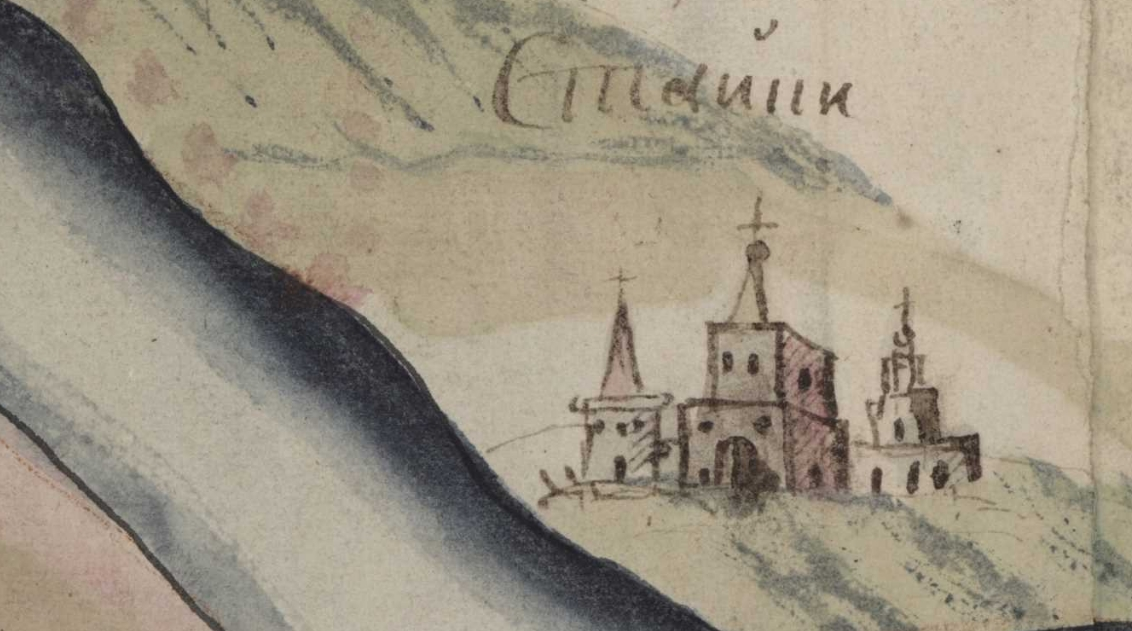 Фрагмент карти Київської губернії. XVIII століття. РГАДА, ф. 192, оп. 1, Киевская губ., № 5.